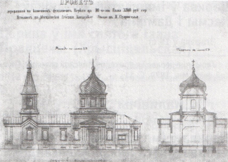 Беларуская (тарашкевіца): Старасельле (Starasielle). Праект царквы